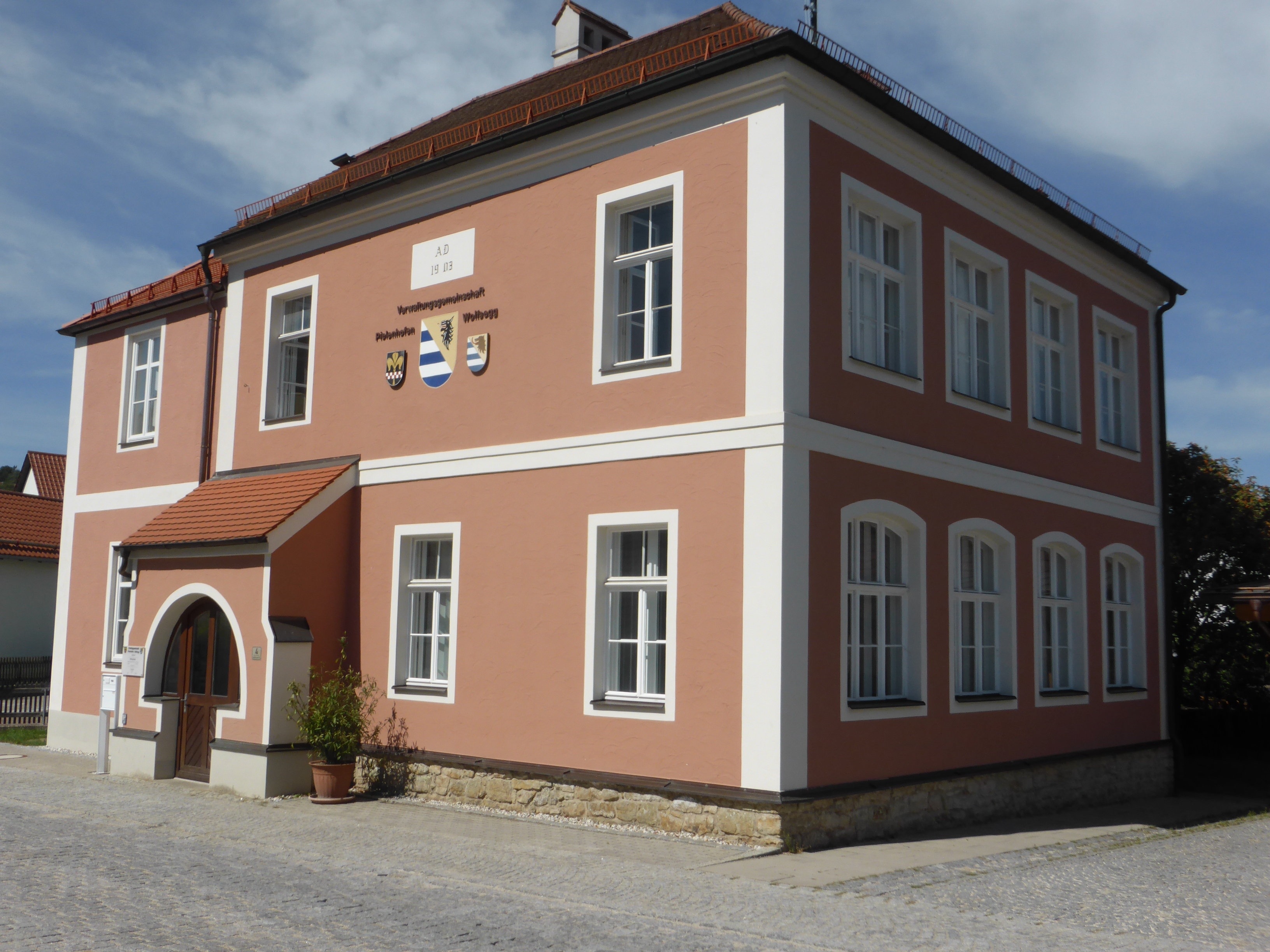 Gemeindekanzlei Wolfsegg-Pielenhofen (Judenberger Straße 4, Wolfsegg)